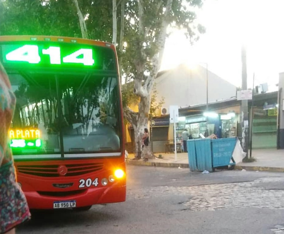 Interno 204 de la Línea 414 (empresa 9 de Julio S.A.T) esperando a su salida en la Estación Florencio Varela.